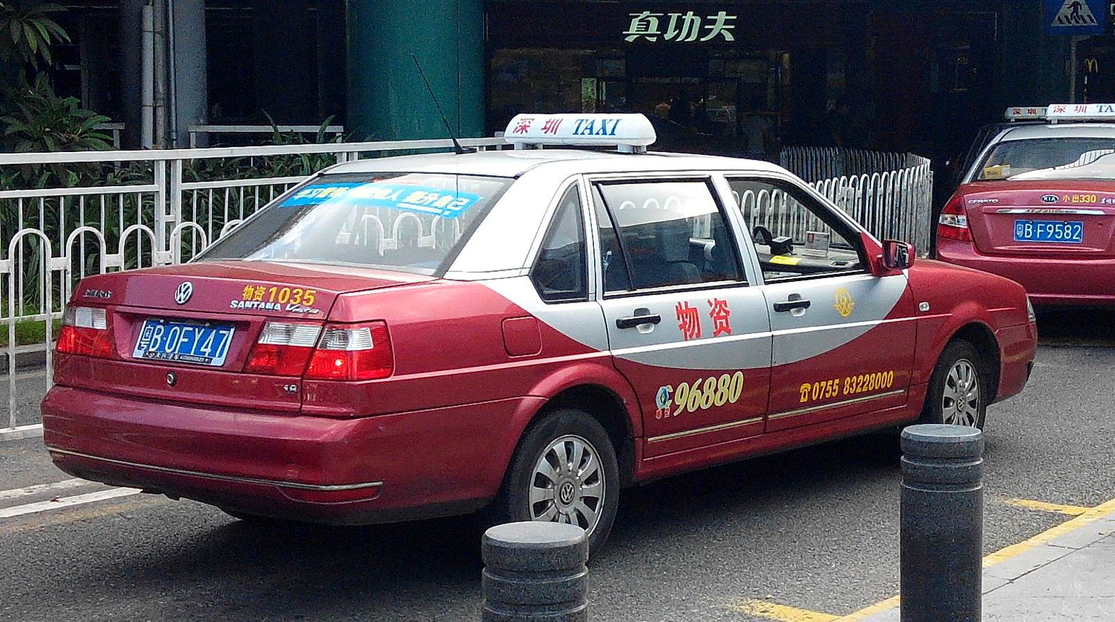 深圳红色的士 大众桑塔纳Vista